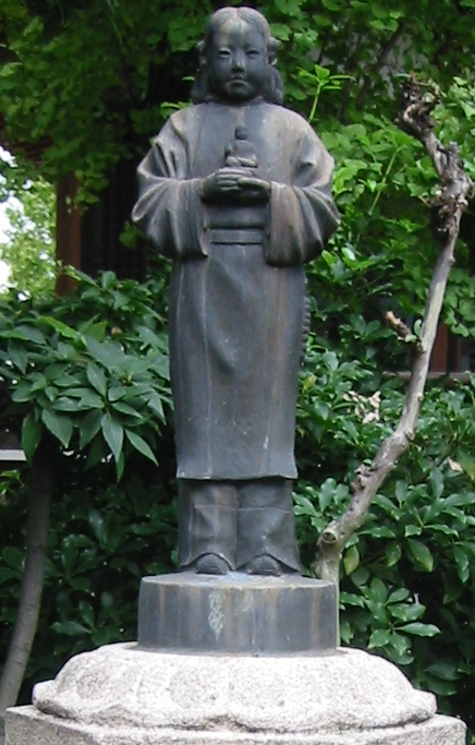 伝教大師最澄(兵庫 能福寺)